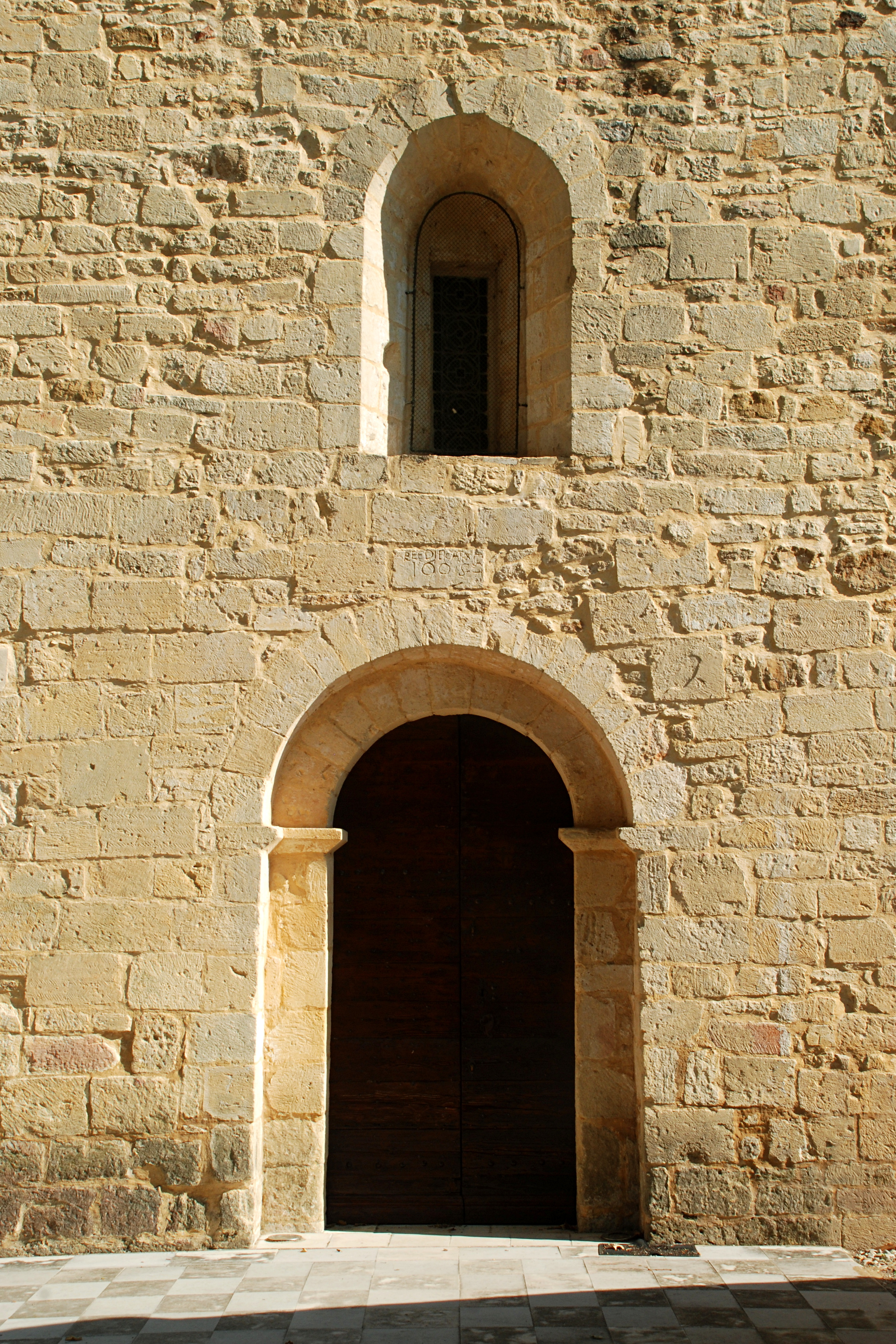 France - Gard - Sabran - Combe - Chapelle Saint-Julien-de-Pistrin